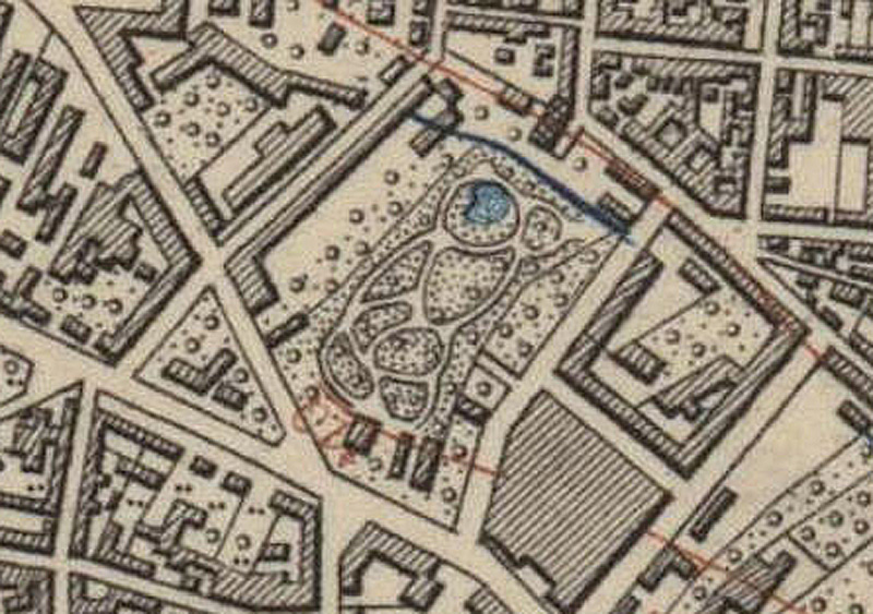 Garten am Privathaus von Willmar Schwabe auf einem Ausschnitt der Äquidistantenkarte Sachsen 1897 Blatt 11